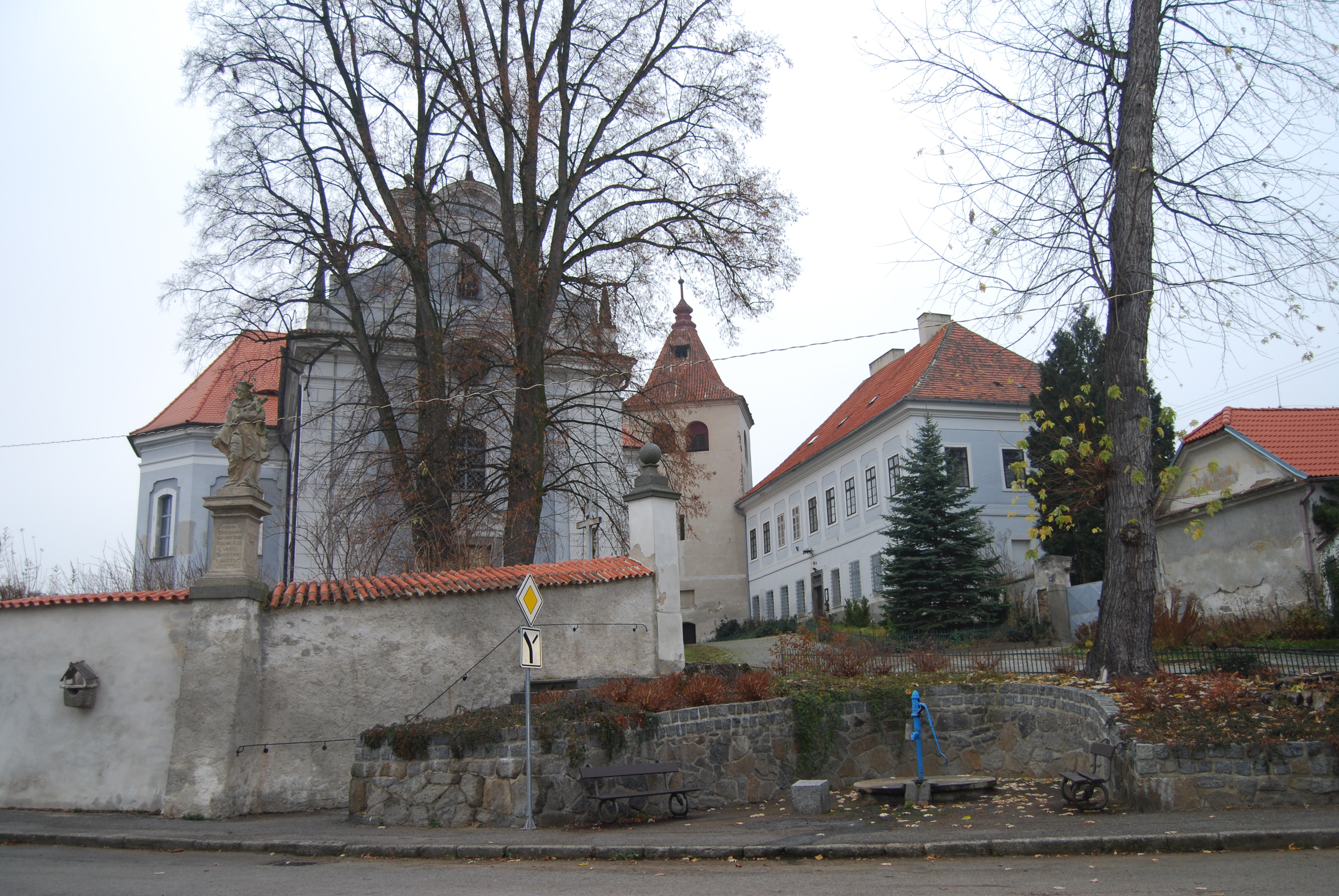 Kostel sv. Klimenta. Mirovice. Okres Písek. Česká republika.